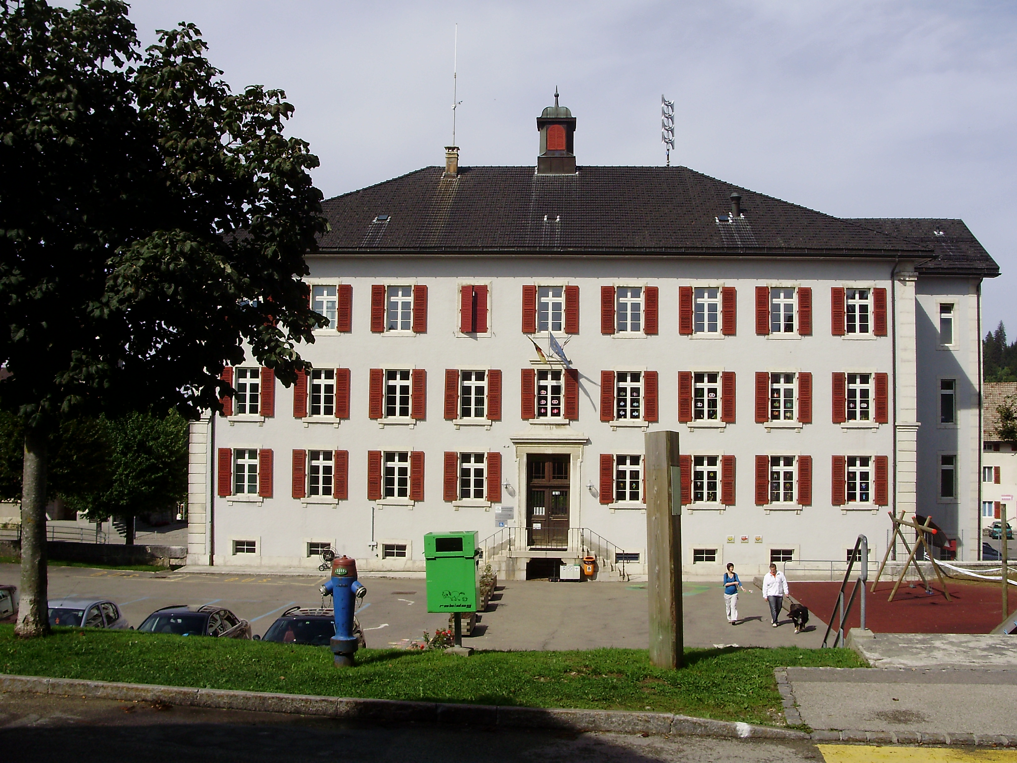 Gemeindehaus